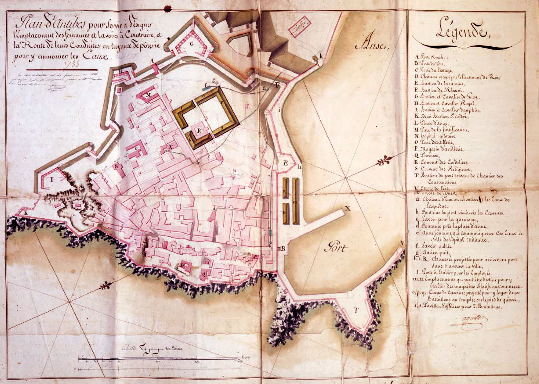 Plan d'Antibes réalisé en 1785 pour montrer la nouvelle alimentation en eau de la ville